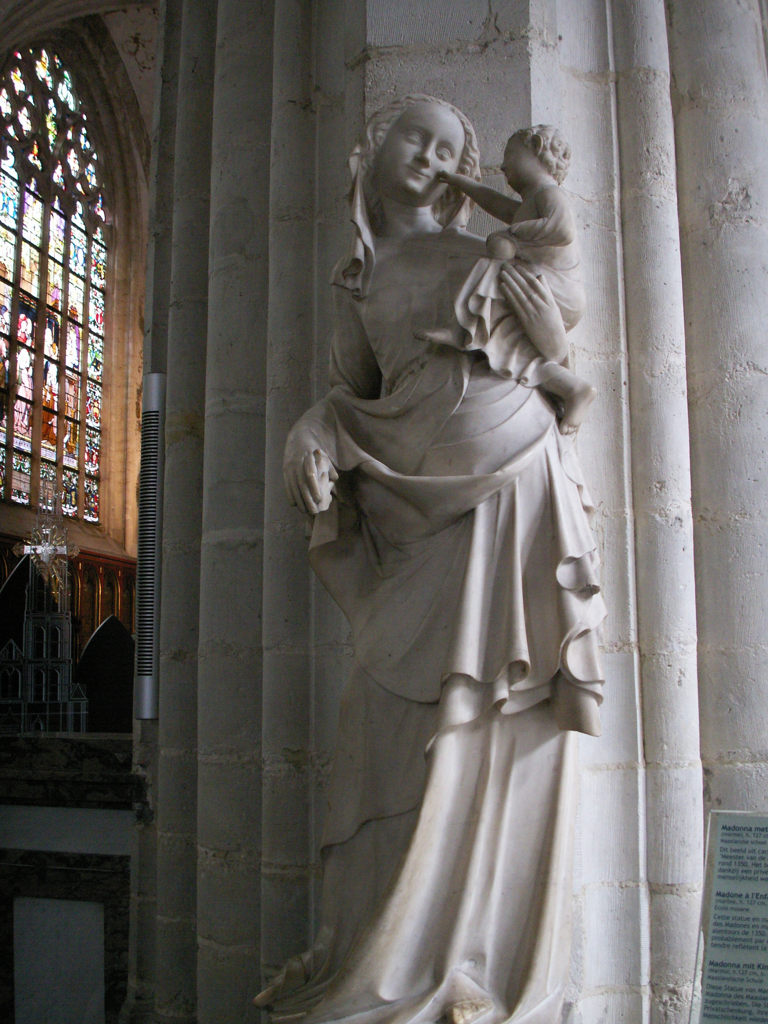 Liebfrauenkathedrale, Madonna mit Kind (Meister der maasländischen Marmor-Madonnen)